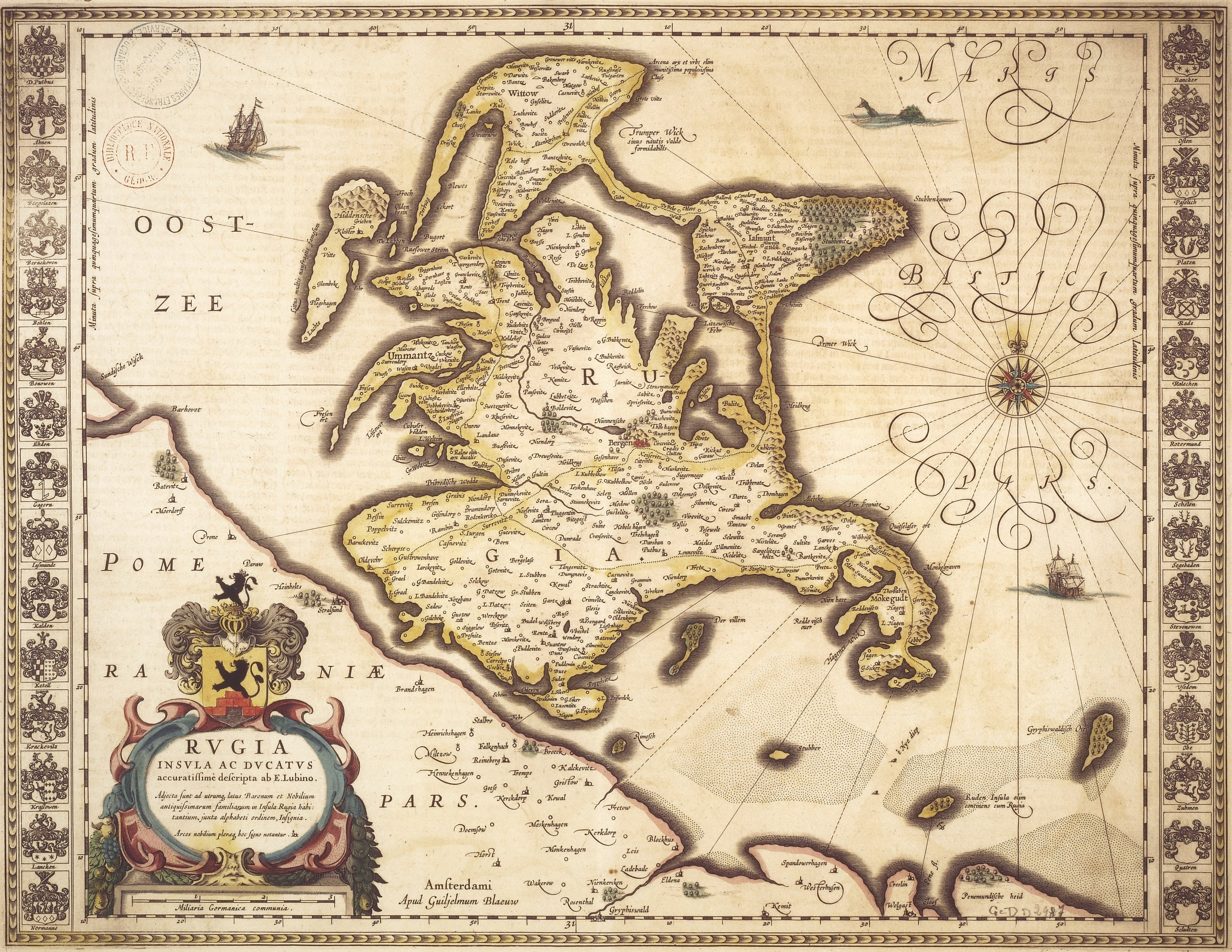 Rugia insula ac ducatus accuratissimè descripta ab E. Lubino